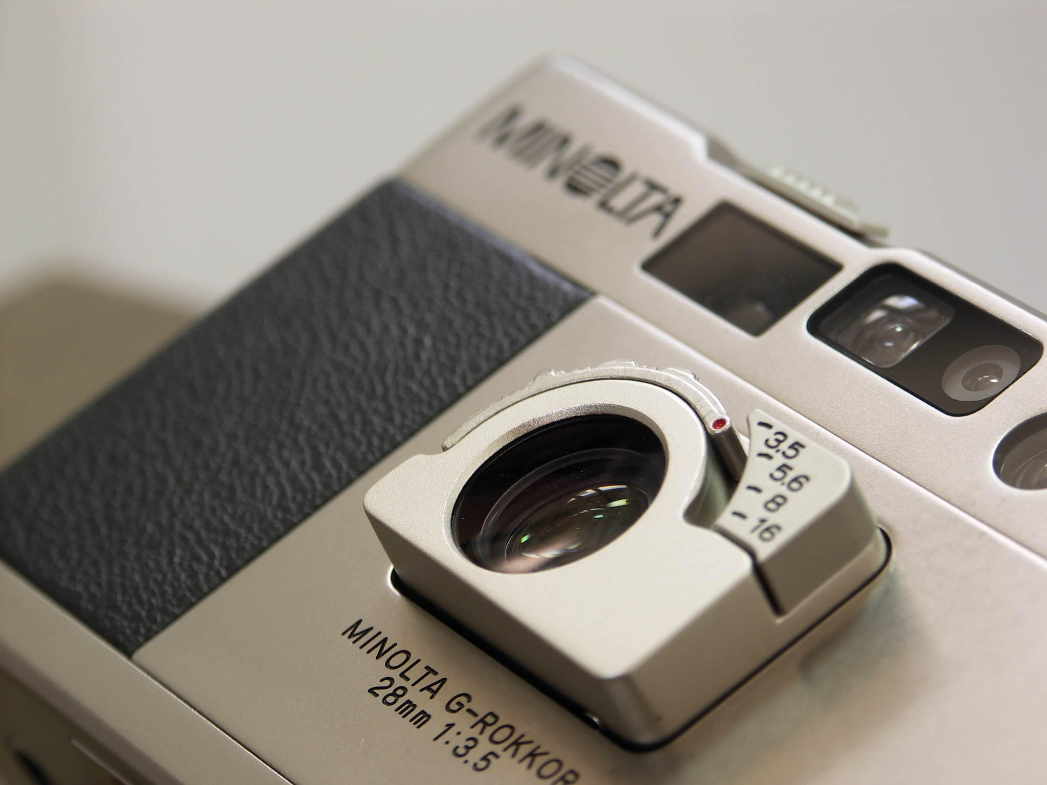 Minolta TC-1 Lens